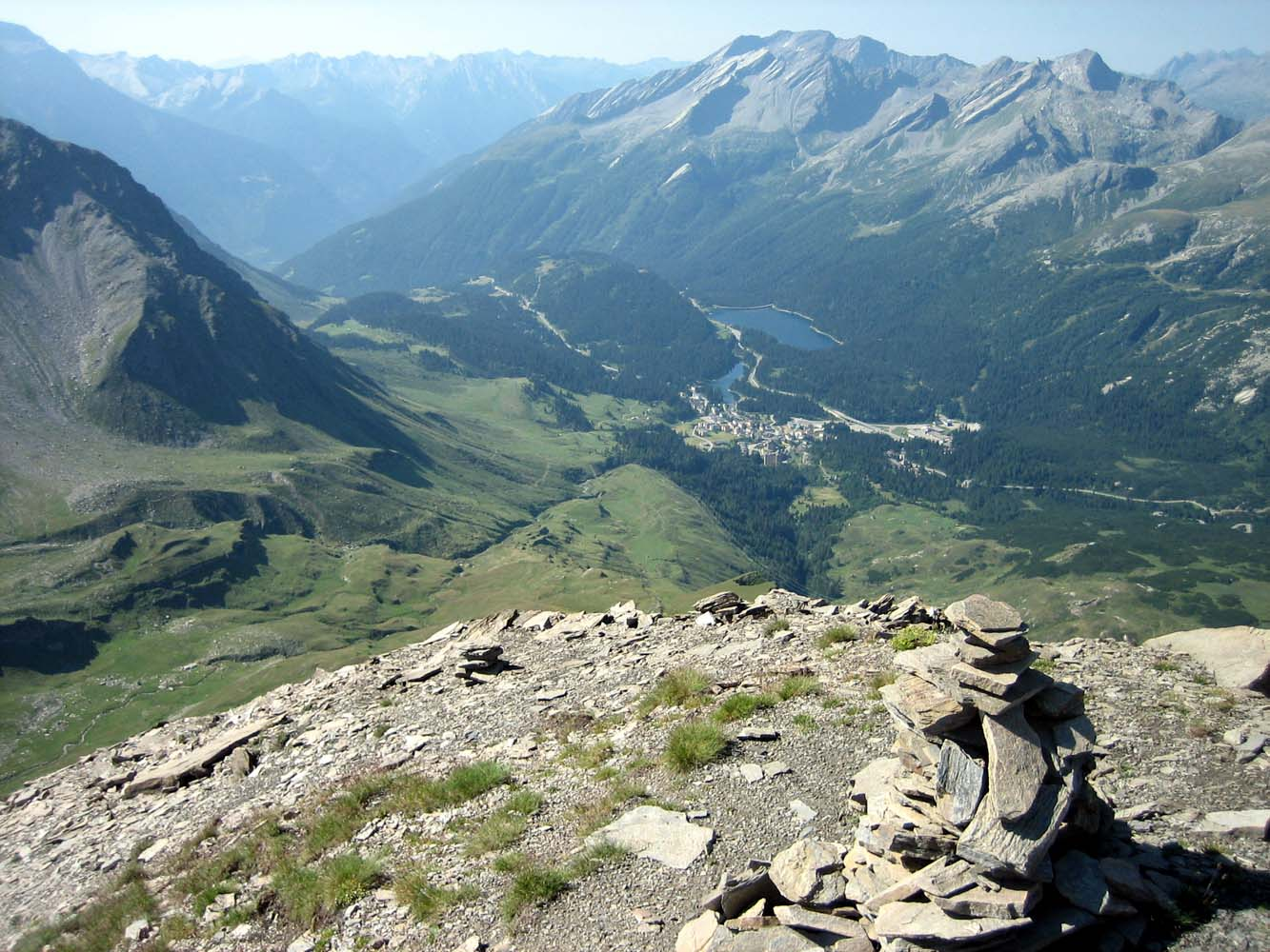 Blick auf San Bernardino vom Pizzo Uccello aus